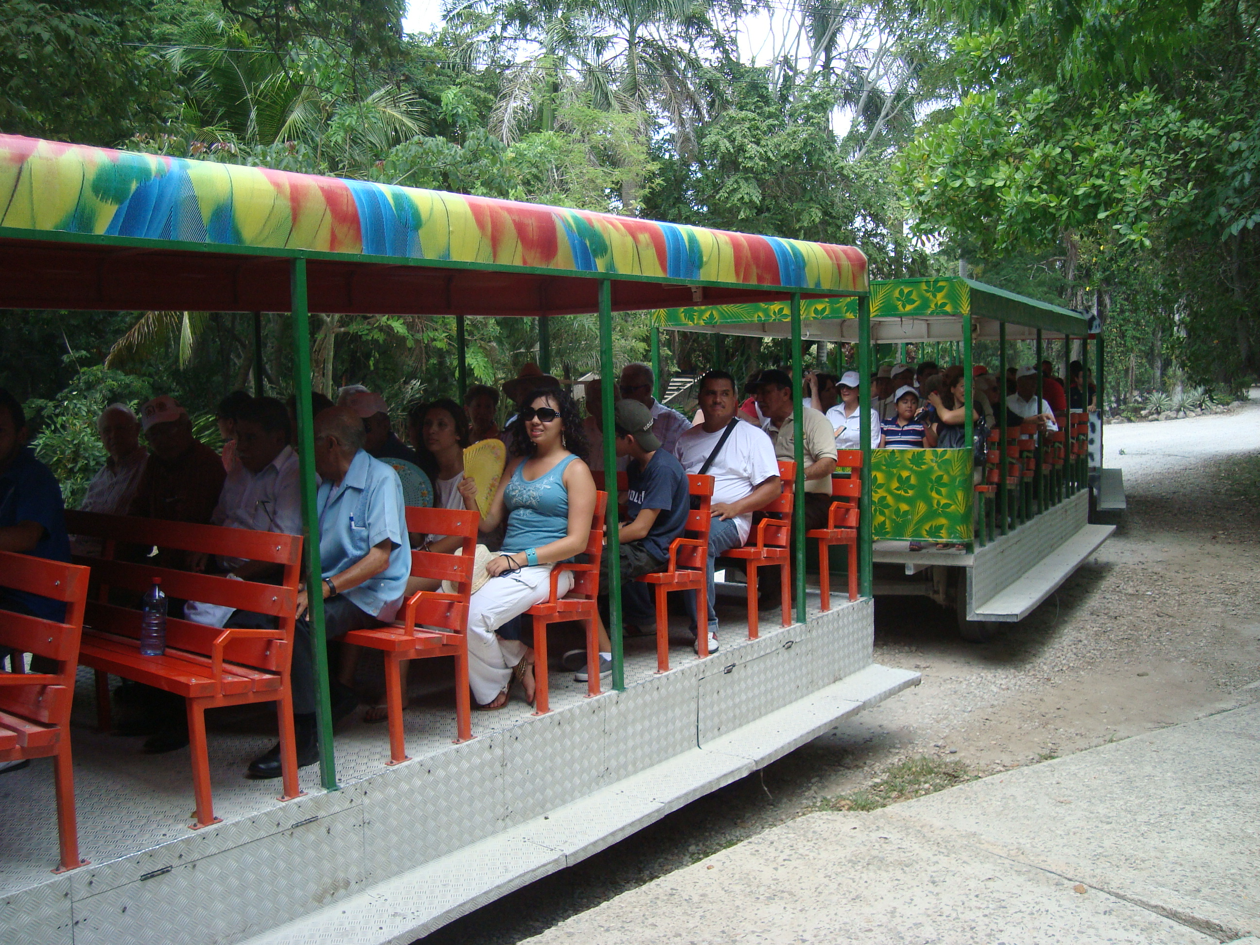 El trenecito para hacer los recorridos en el área de la sabana en el Parque Ecológico "Yumká"